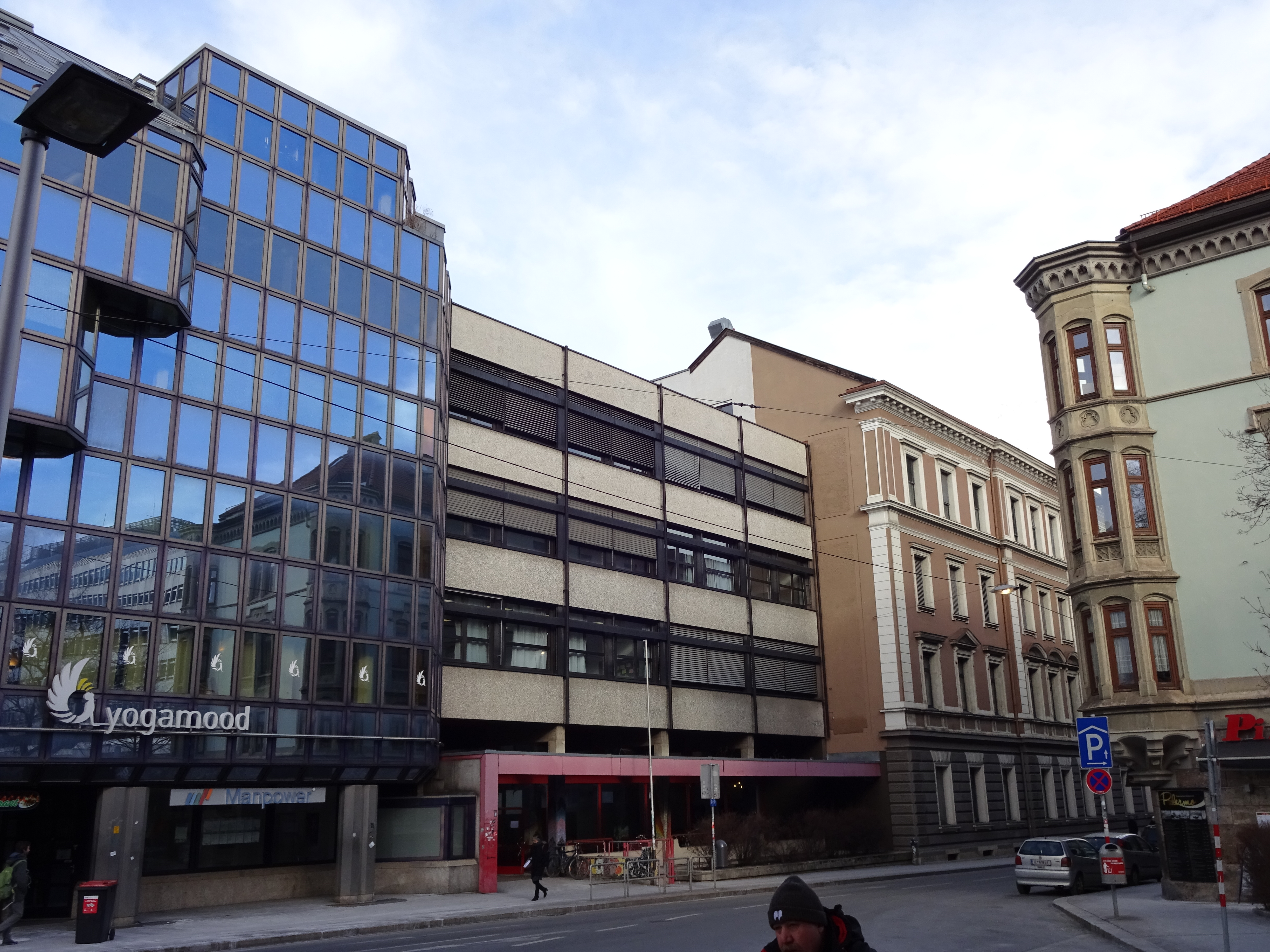 BG und BRG Sillgasse, Innsbruck This media shows the remarkable cultural object in the Austrian state of Tyrol listed by the Tyrolean Art Cadastre with the ID 120647. (on tirisMaps, pdf, more images on Commons, Wikidata)